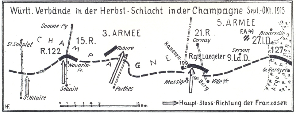 Karte Seite 47: Württ. Verbände in der Herbst-Schlacht in der Cuampagne Sept. - Okt. 1915